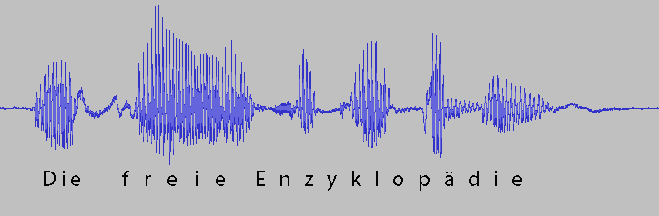 Grafik als Beispiel für eine kontinuierliche Phrase